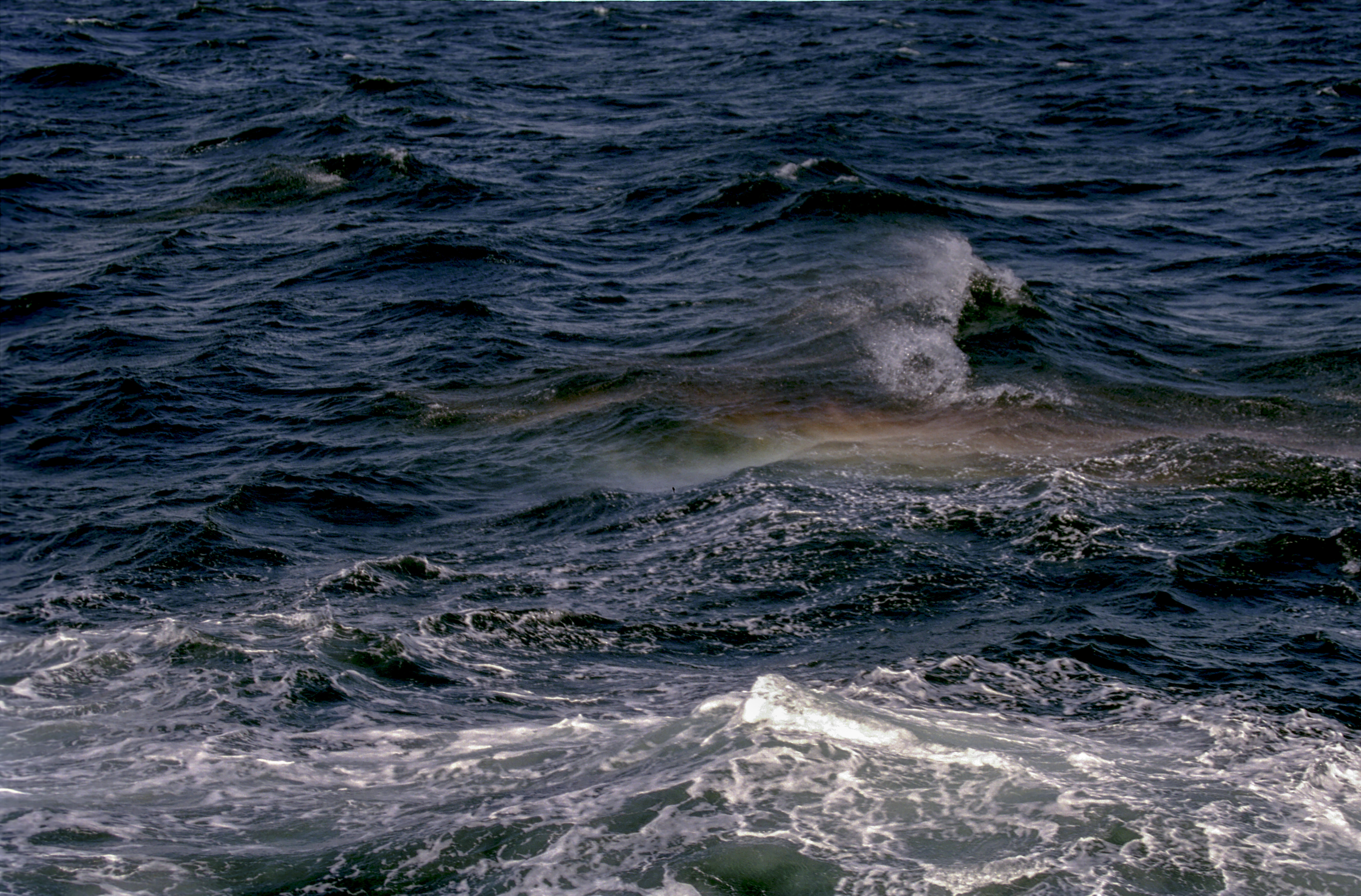 Antarctica, landscape